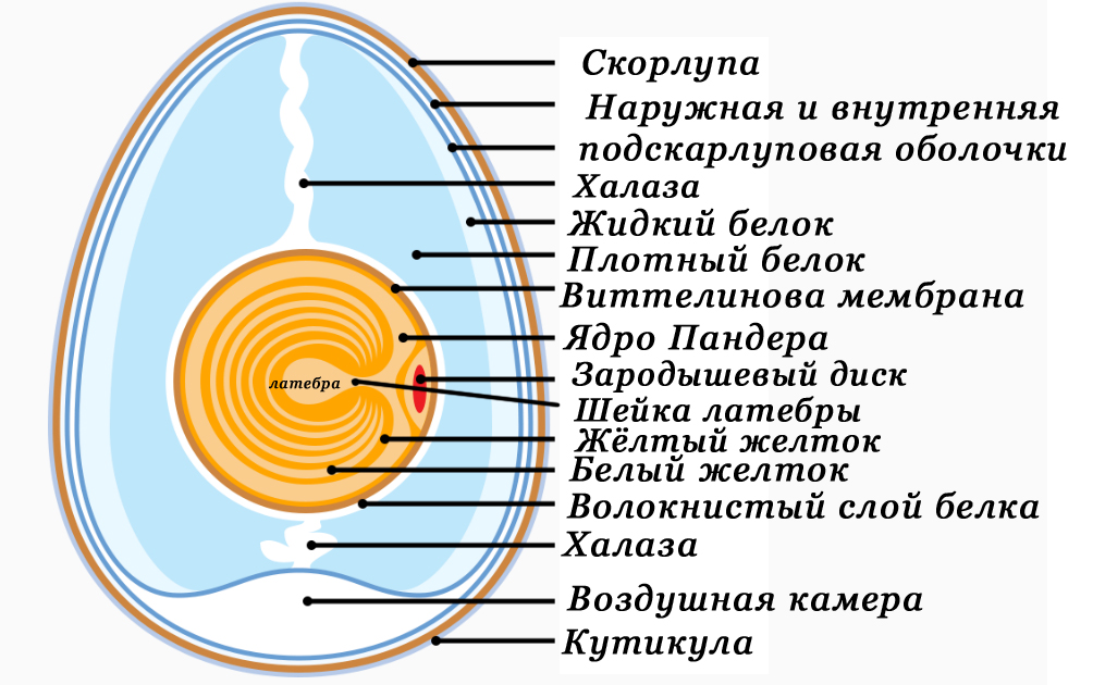 Строение куриного яйца